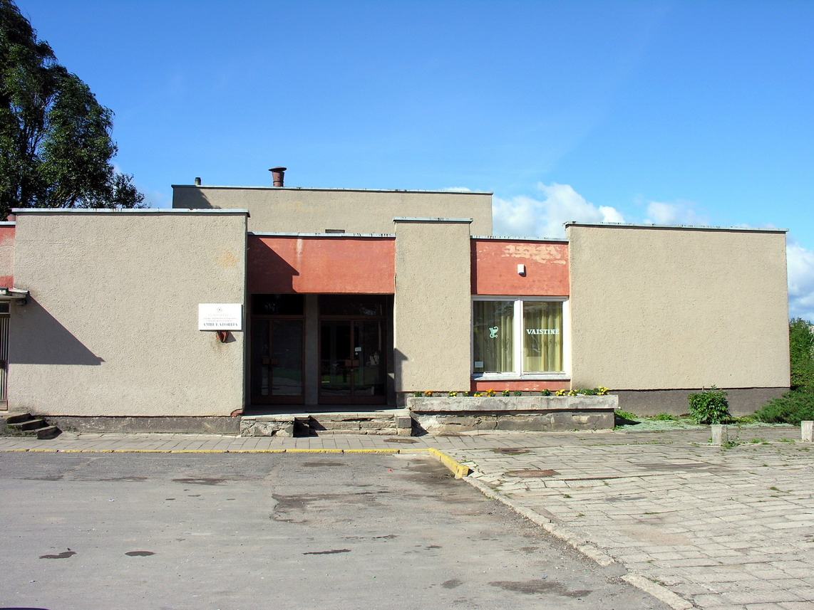 Židikai, Mažeikių raj. Židikų ambulatorija Foto: Algirdas, 2006 m. rugsėjo 9 d., Lietuva